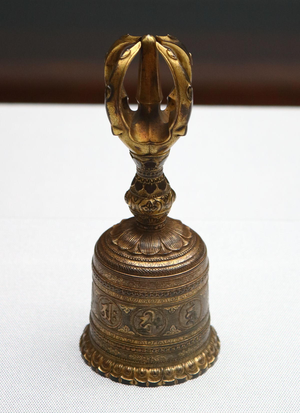 金銅八仏種子五鈷鈴（重要文化財）、平安時代・12世紀。東京国立博物館。